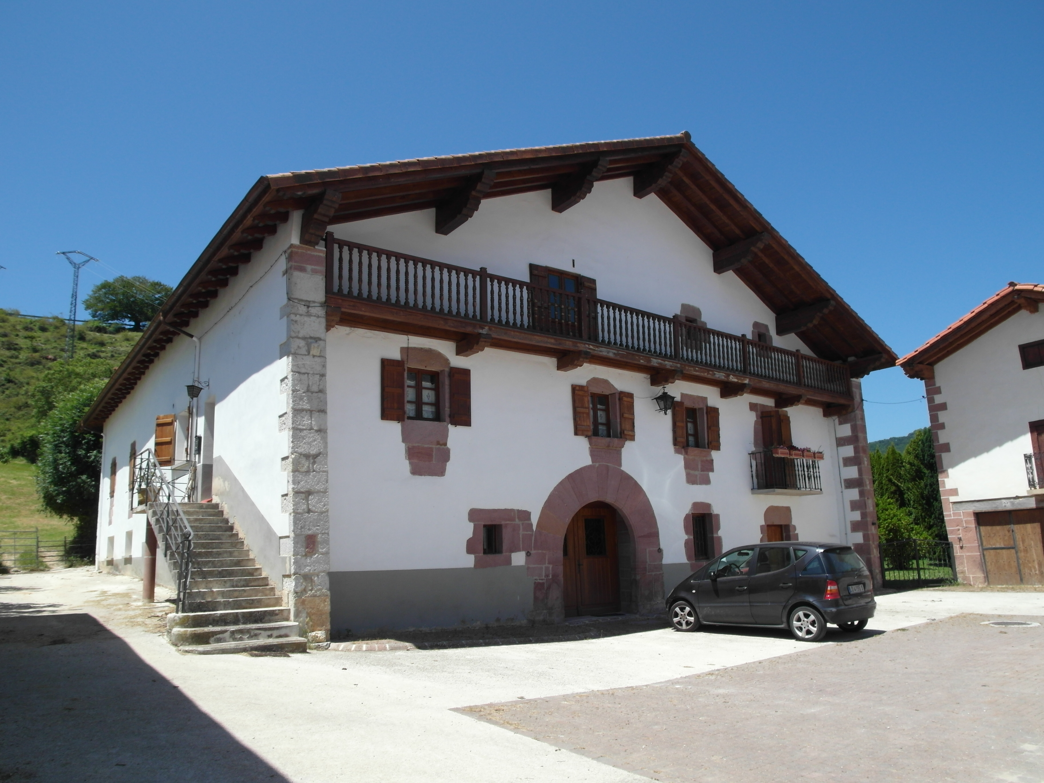 Casa típica de Iragi, Navarra.